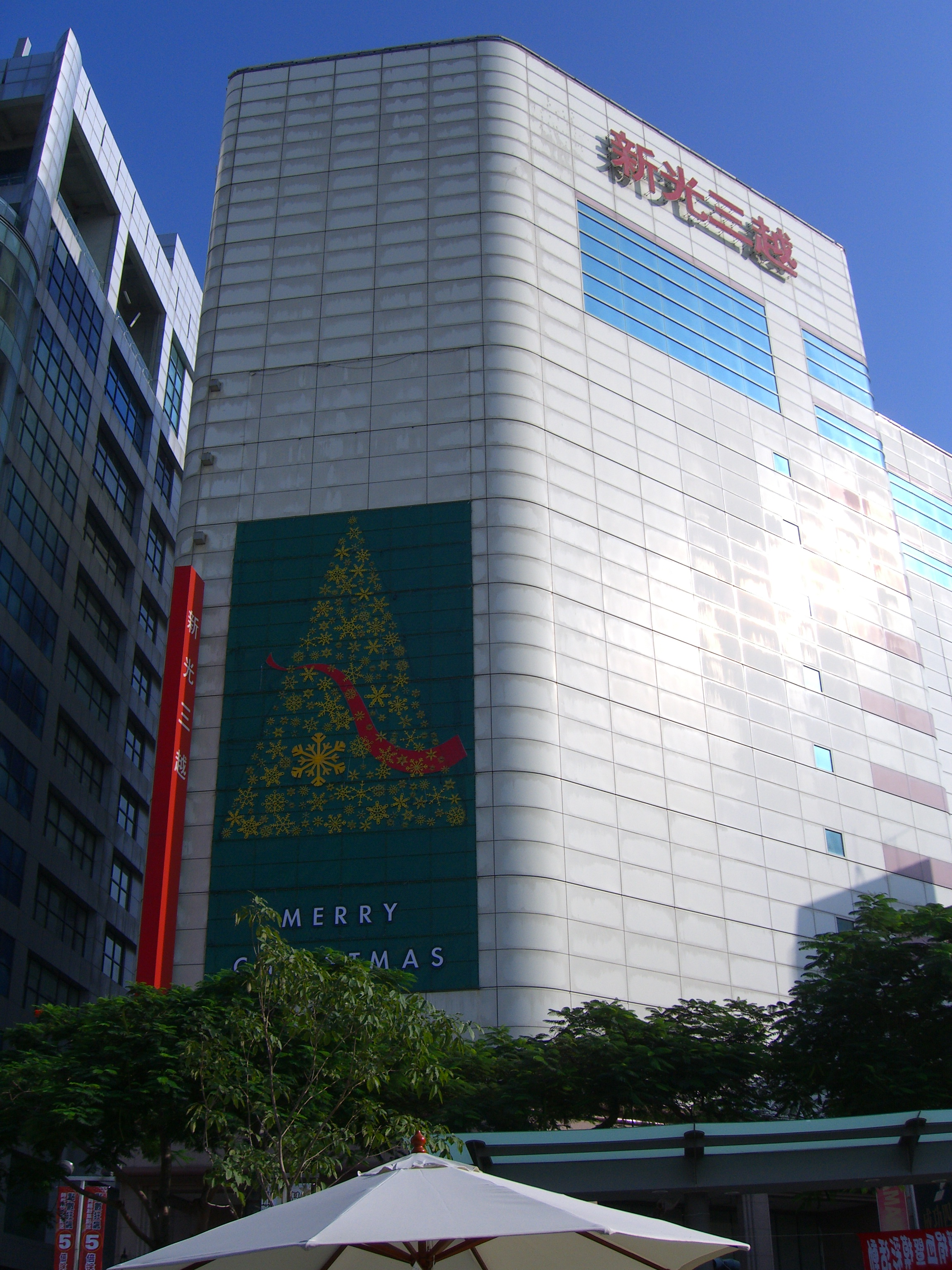 Shin Kong Mitsukoshi Tainan ChungShan Store 新光三越台南中山店